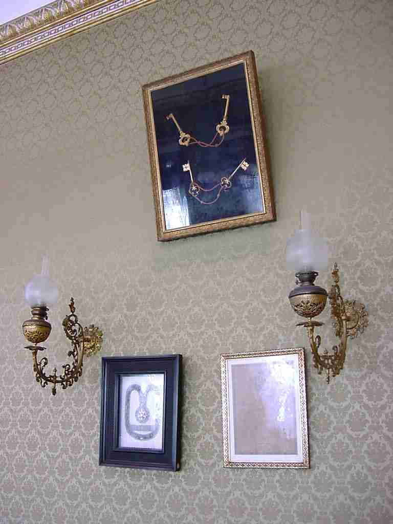 âmara Municipal de Angra do Heroísmo, as chaves da cidade.